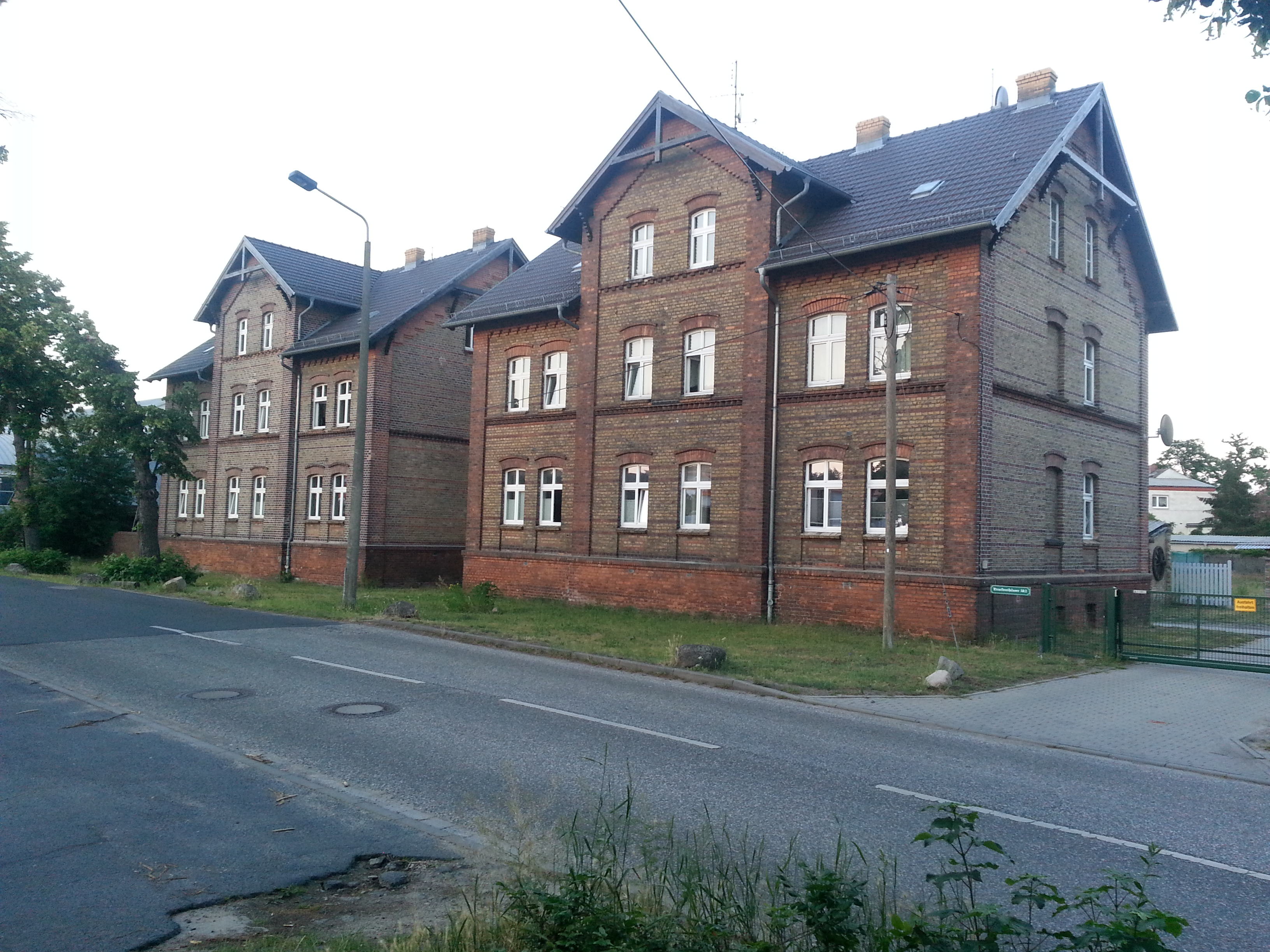 Denkmalgeschützte Druckereihäuser in der Industriestraße 1b in Trebbin